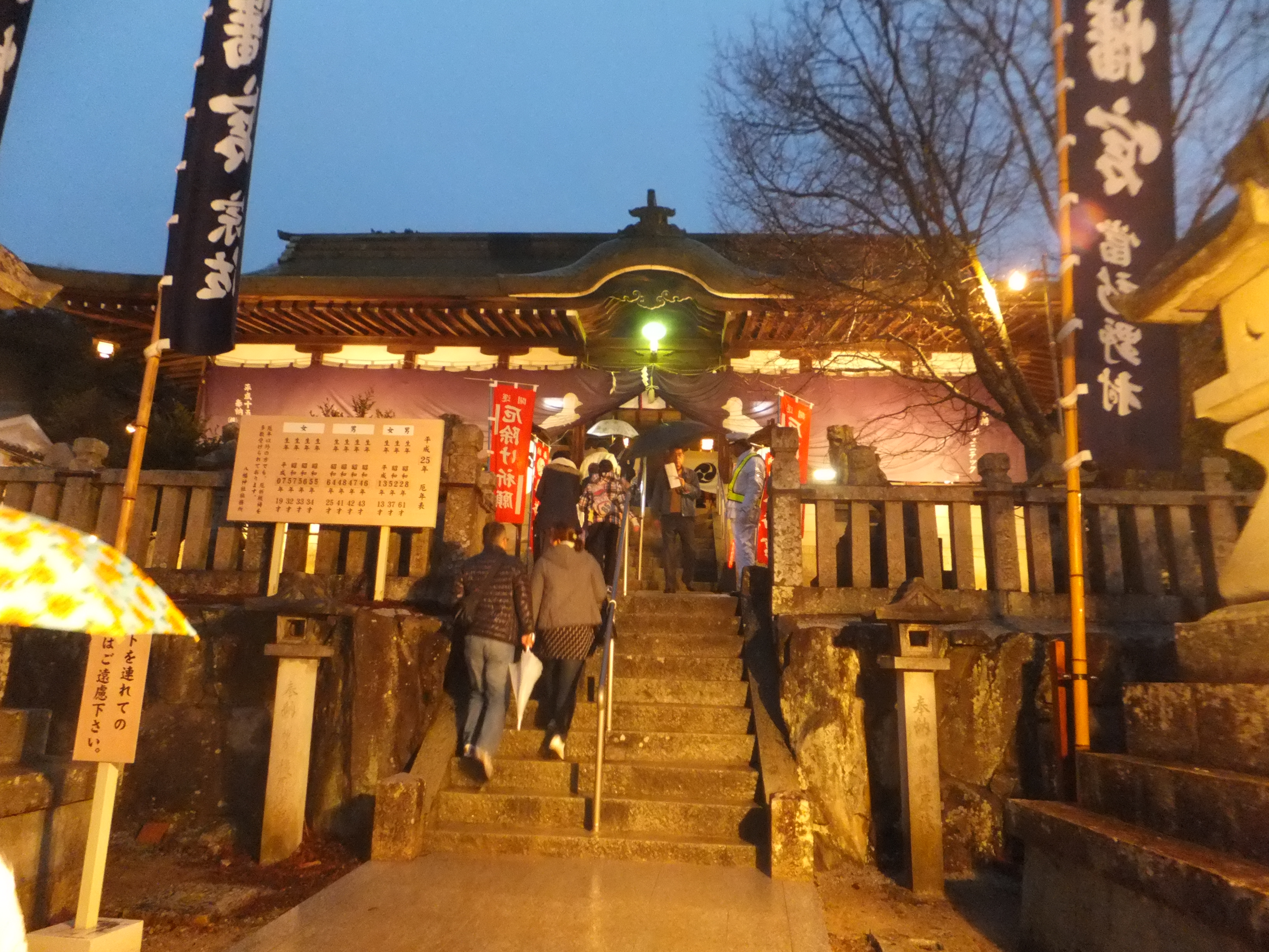 宗佐厄神八幡神社厄除大祭